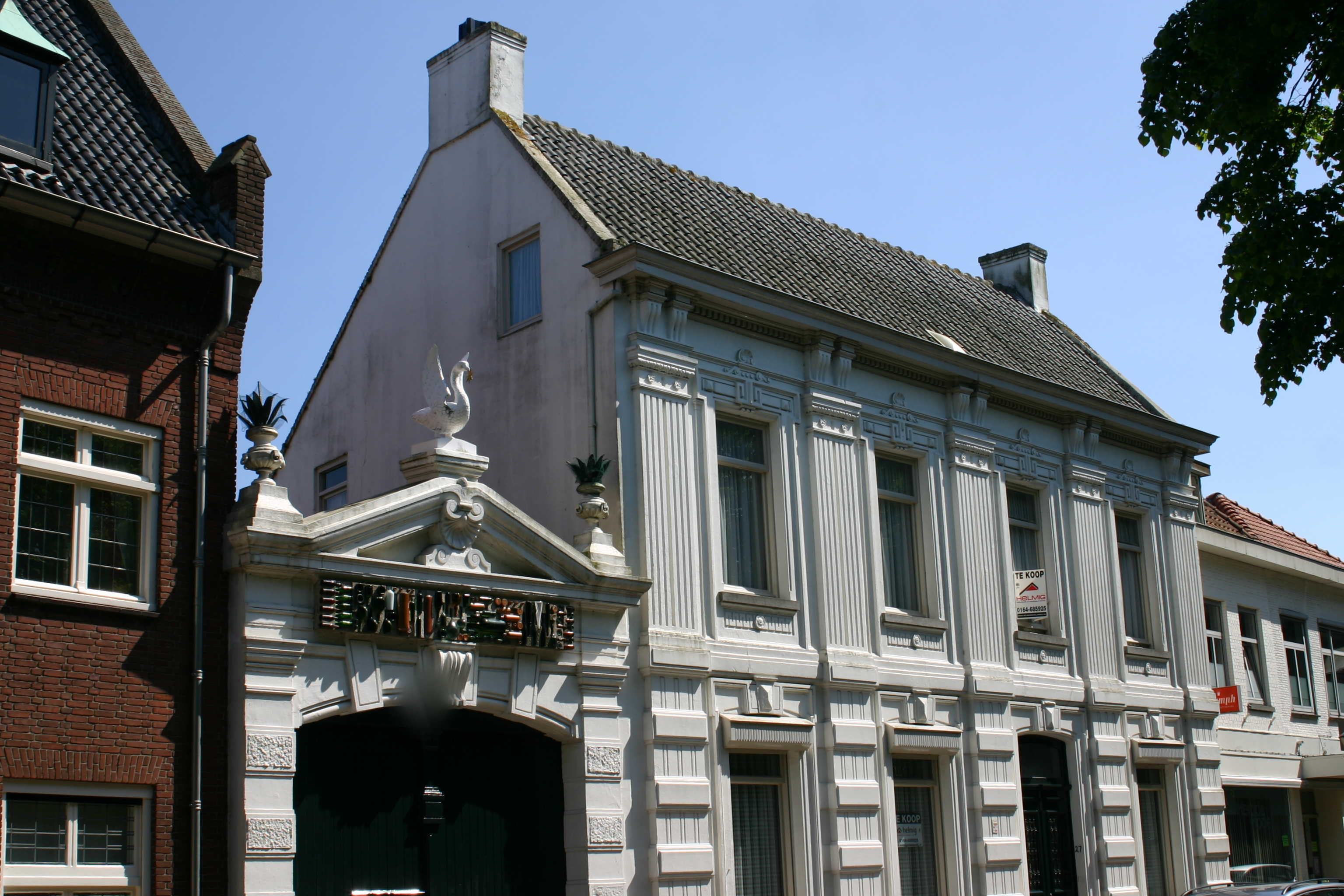 Brouwerij De Zwaan